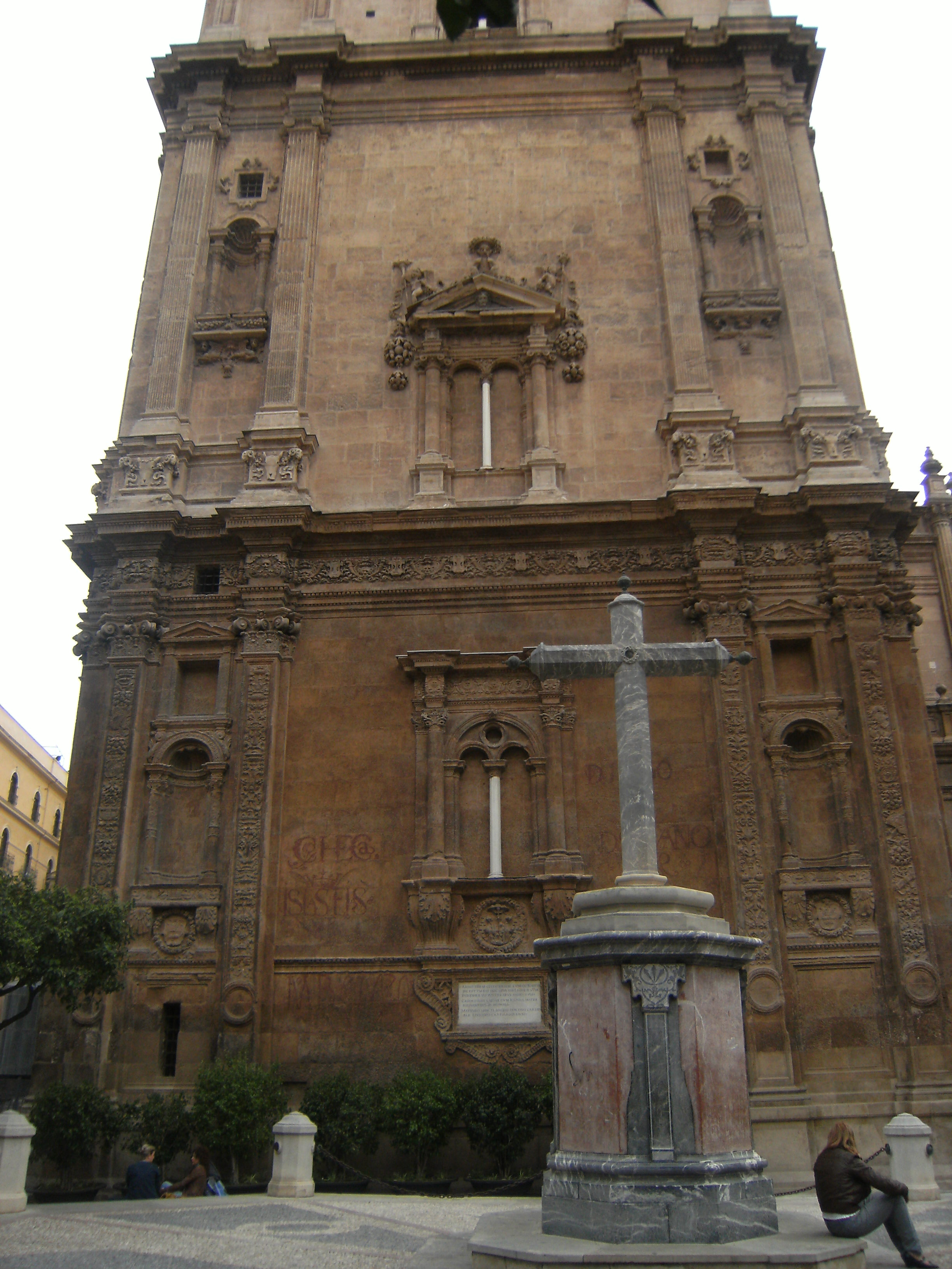 Primer y segundo cuerpo de la Torre de la Catedral de Murcia, construidos en estilo renacentista entre 1521 y 1555